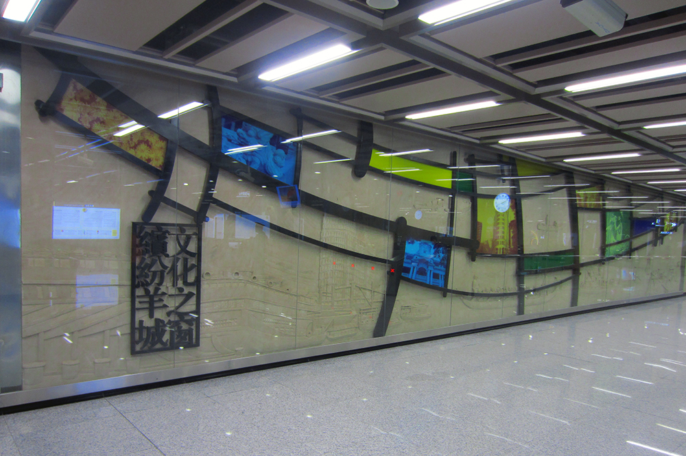 粵語: 文化公園站文化藝術牆